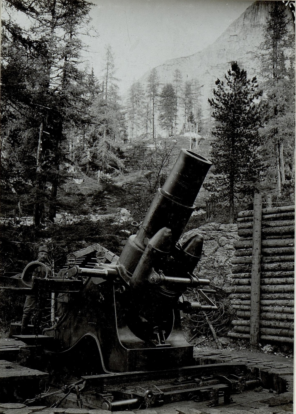 24 cm Mörser in Feuerstellung am Valparola